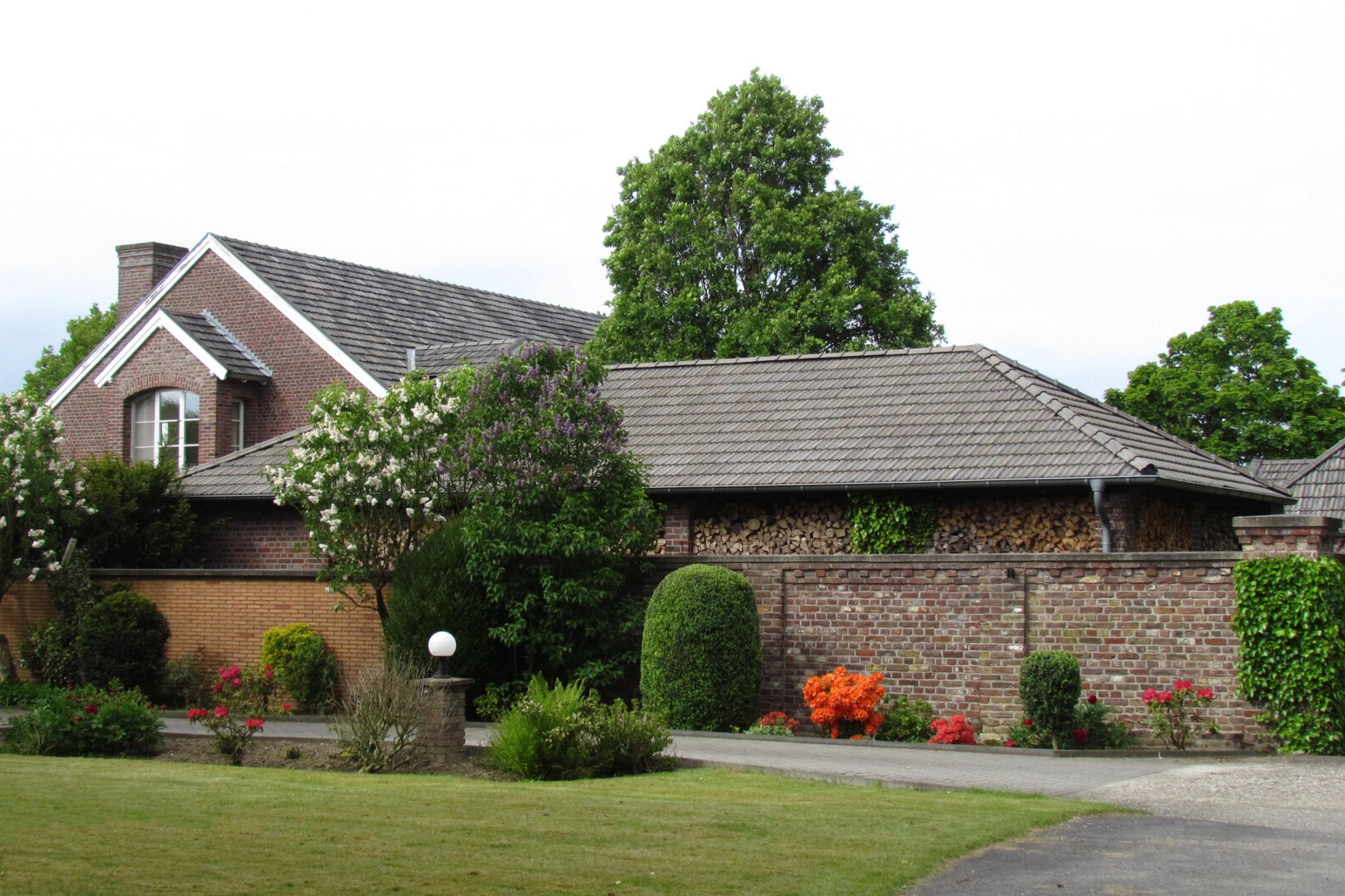 Die Henkenmühle in Viersen - Boisheim